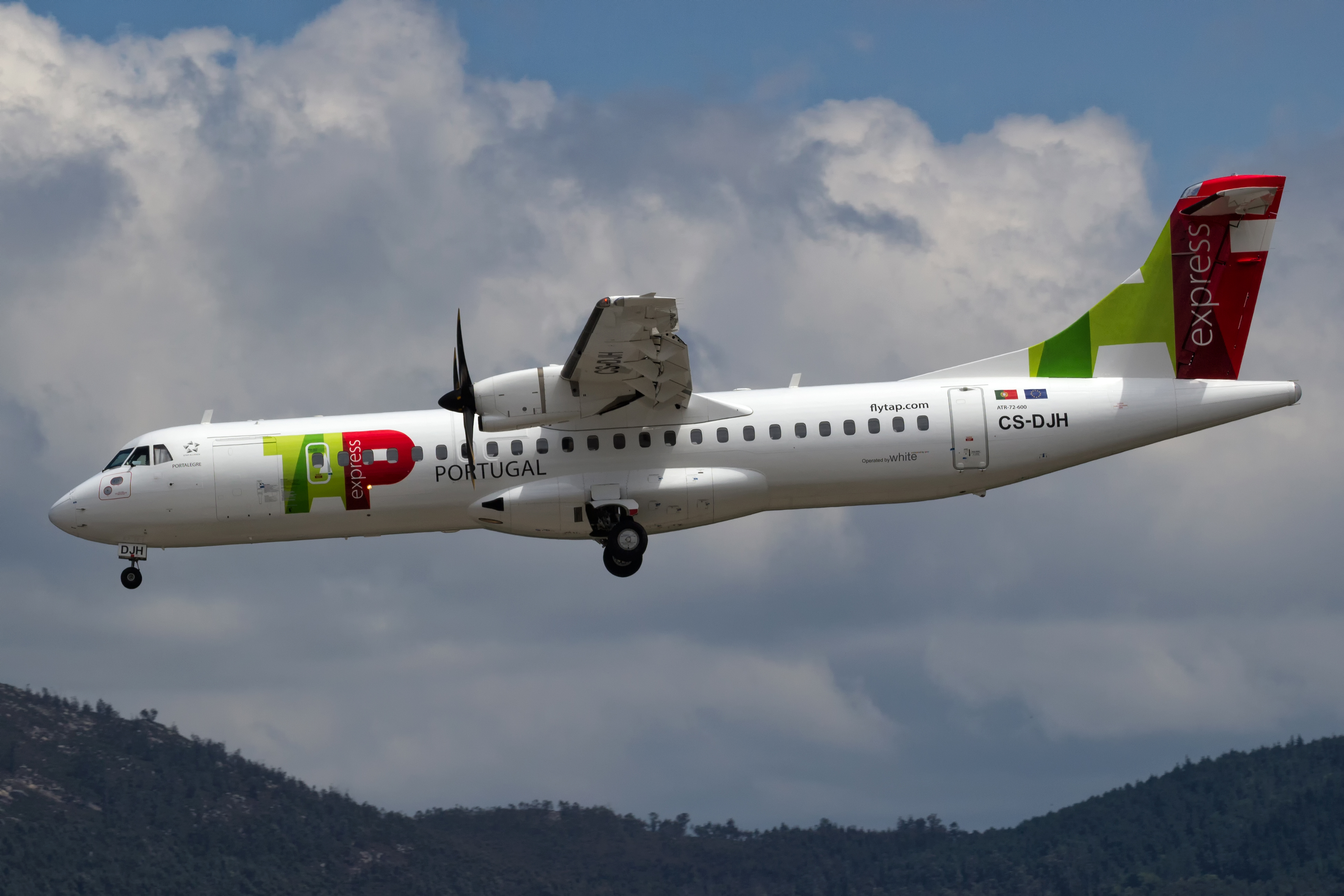 ATR 72 de TAP Express aterrando no aeroporto de Vigo.